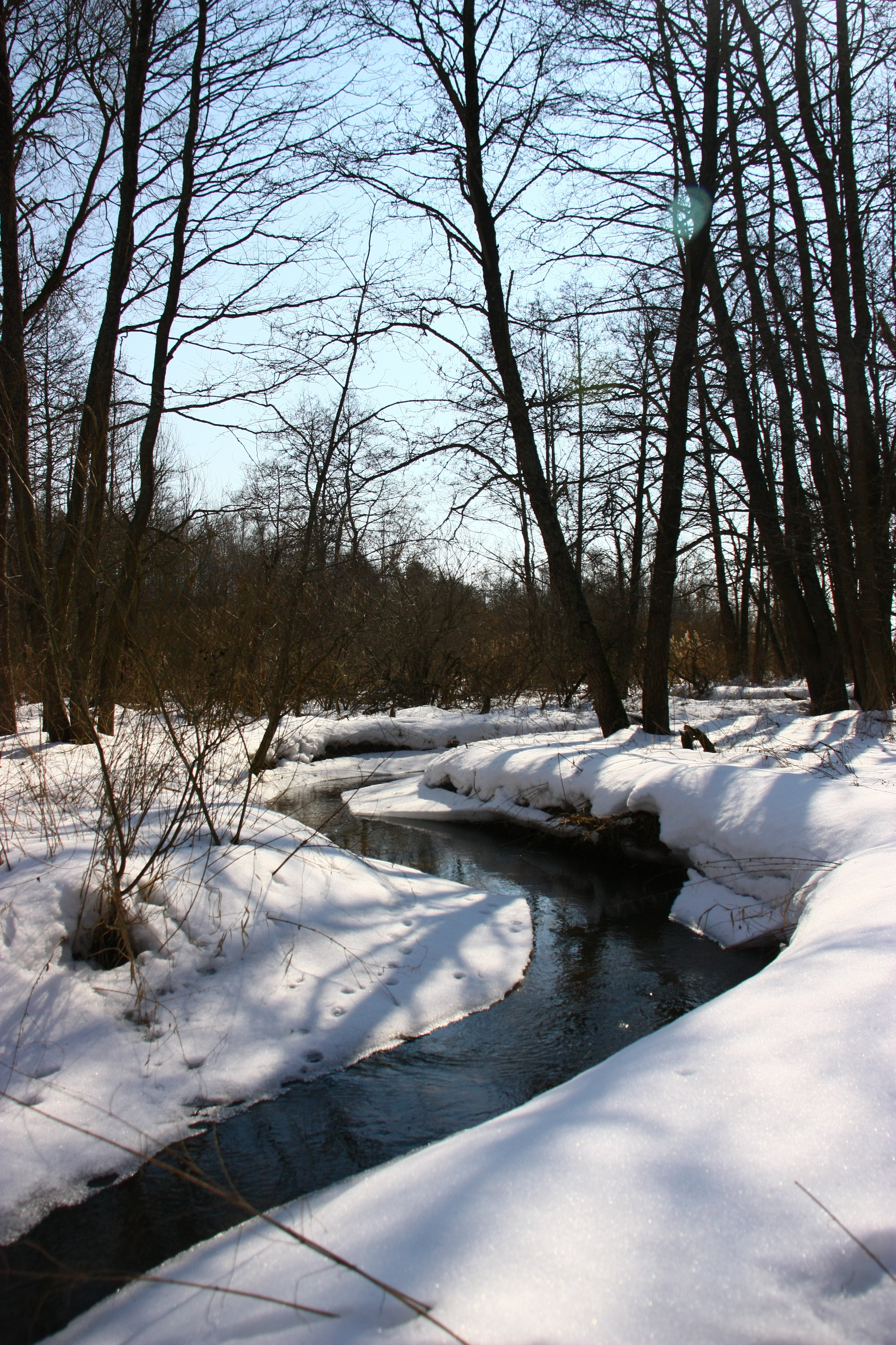 Речка Кохля. В нижнем течении.